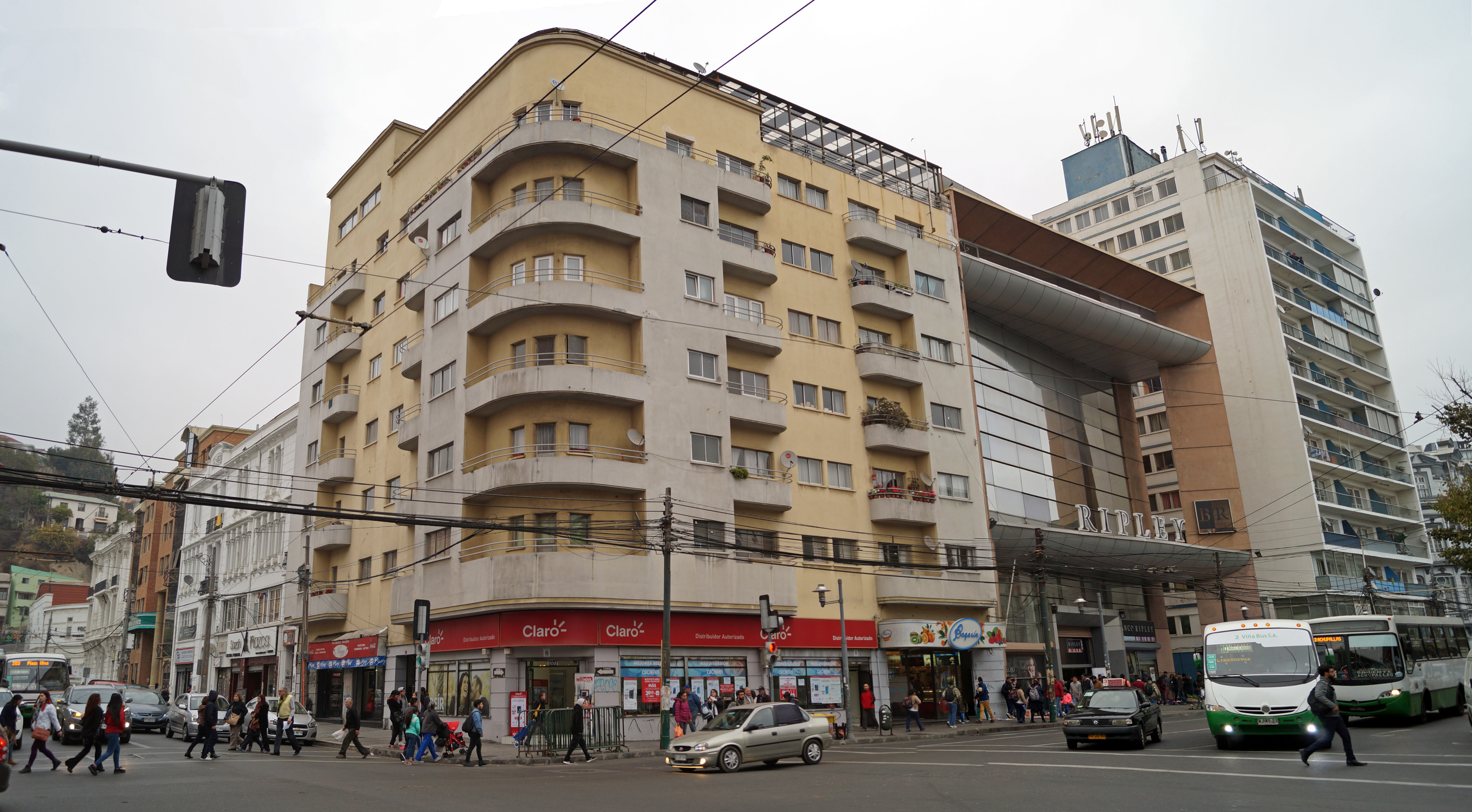 Edificio mandado a construir por la Cooperativa Vitalicia Plaza Victoria de Valparaíso, Chile